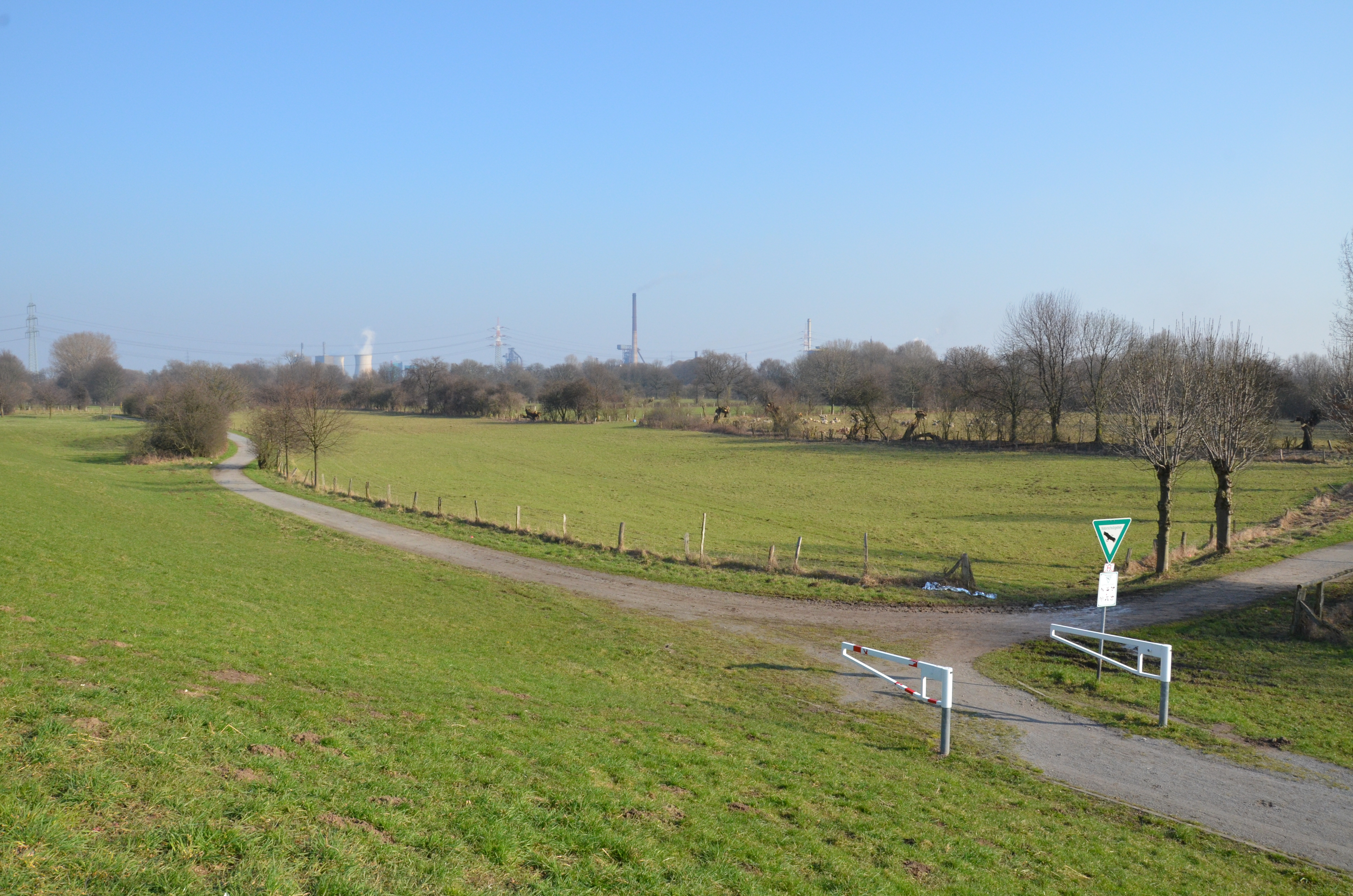 NSG Rheinaue Friemersheim im Bezirk Rheinhausen der Stadt Duisburg